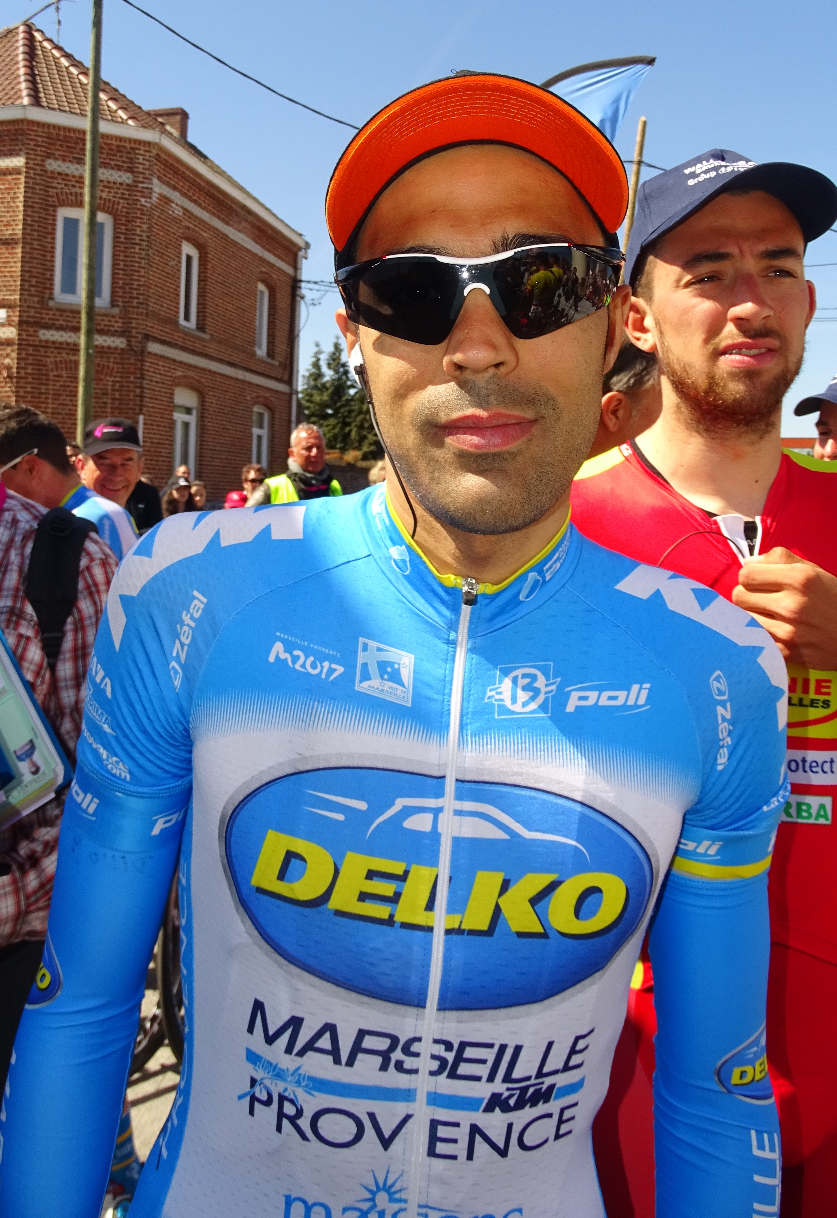 Reportage réalisé le jeudi 5 mai 2016 à l'occasion du départ et de l'arrivée de la deuxième étape des Quatre jours de Dunkerque 2016 à Aniche, Nord, Nord-Pas-de-Calais, France.